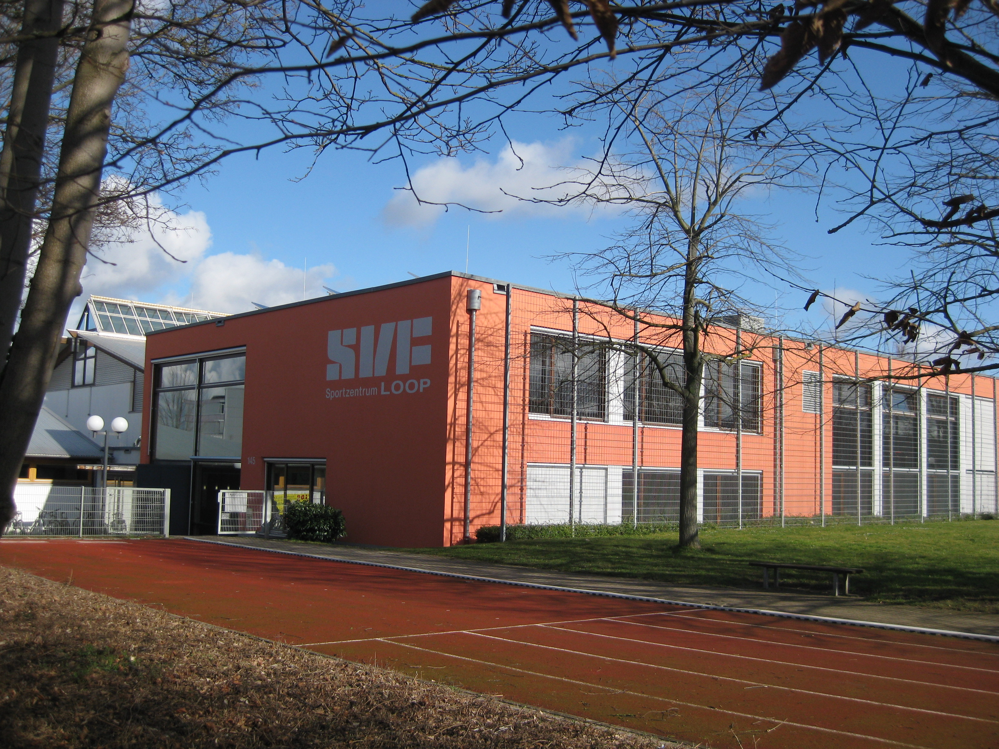 Sportstätte in Fellbach